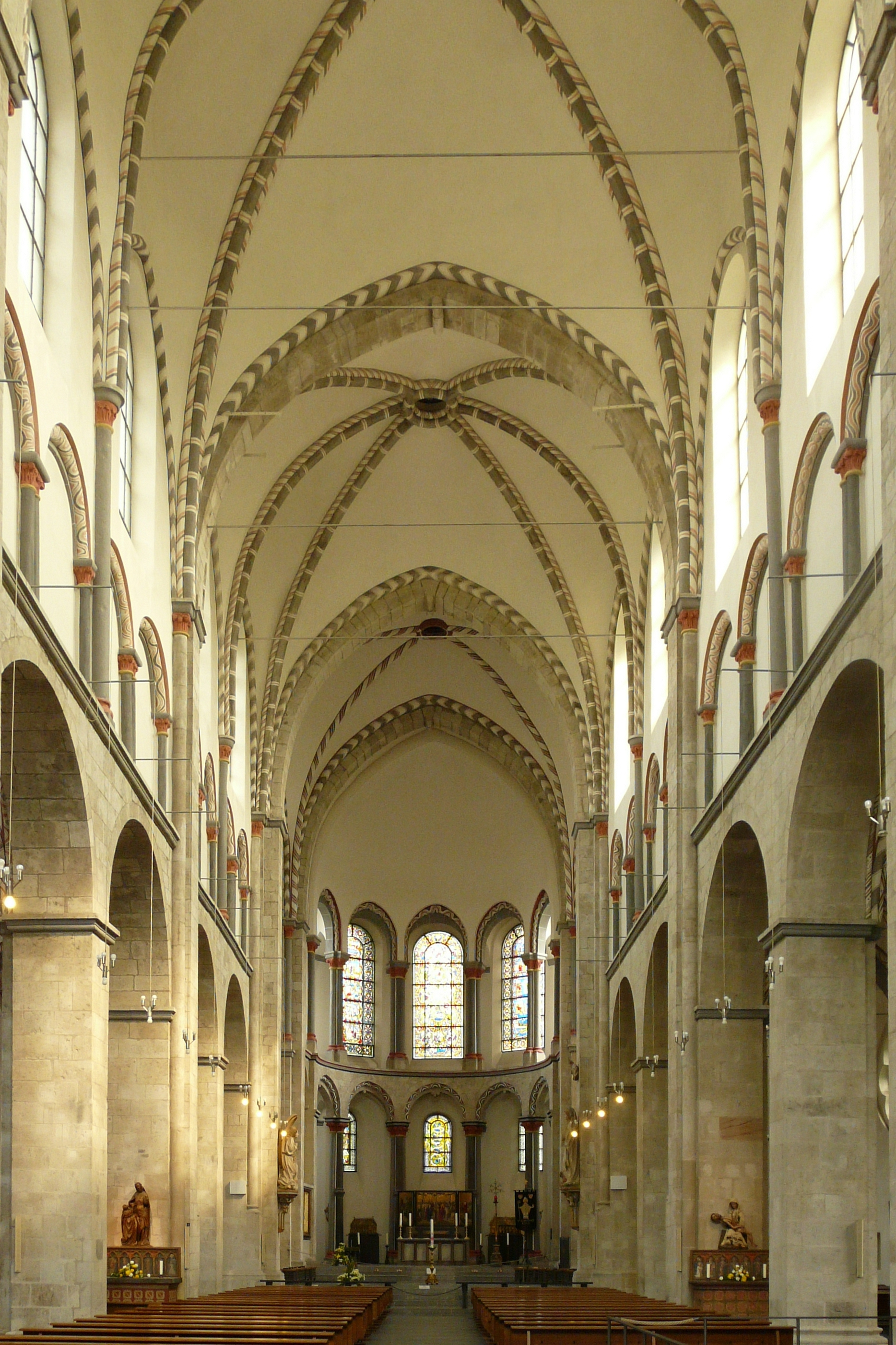 Das Hauptschiff der Kirche mit Blick nach Osten auf den Chor und der Apsis